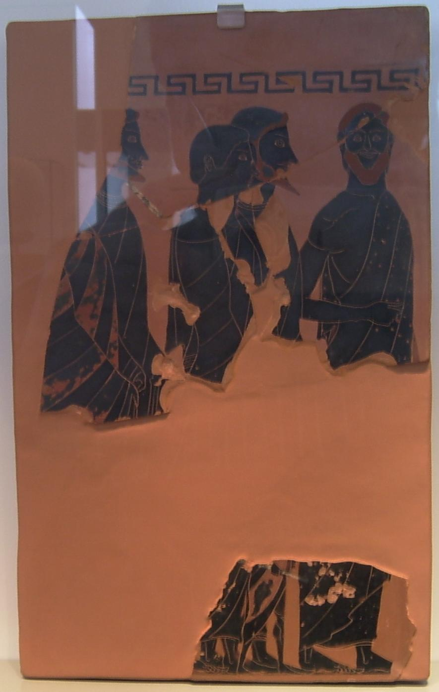 Grabpinakesfragmente des Vasenmalers Exekias, eine von 16 im schwarzfigurigen Stil bemalte Tontafeln, eine Prothesis (Totenklage) und einen Totenzug darstellend, gefunden auf dem Kerameikos in Athen, zwischen 540 und 530 v. Chr., 43 × 37 cm, Antikensammlung Berlin